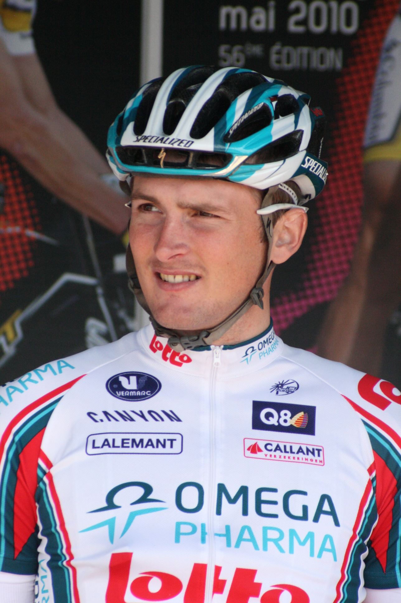 Mickael Delage, lors de la présentation des équipes des 4 jours de Dunkerque 2010